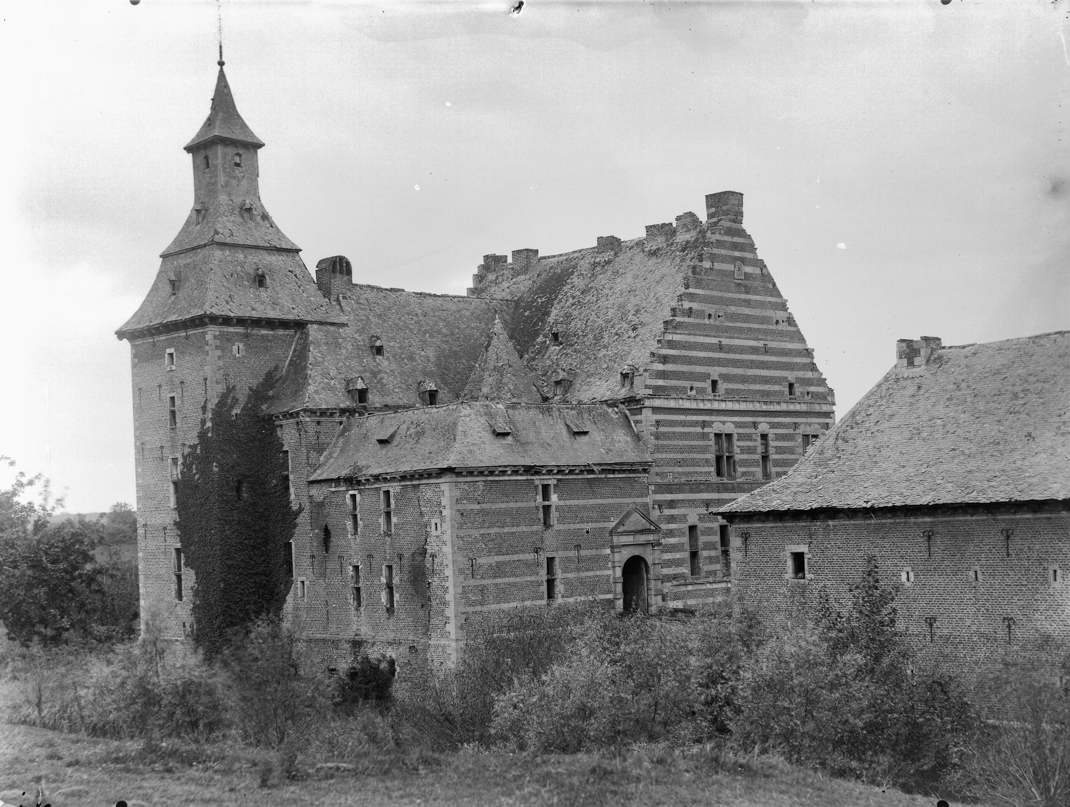 Kasteel: exterieur